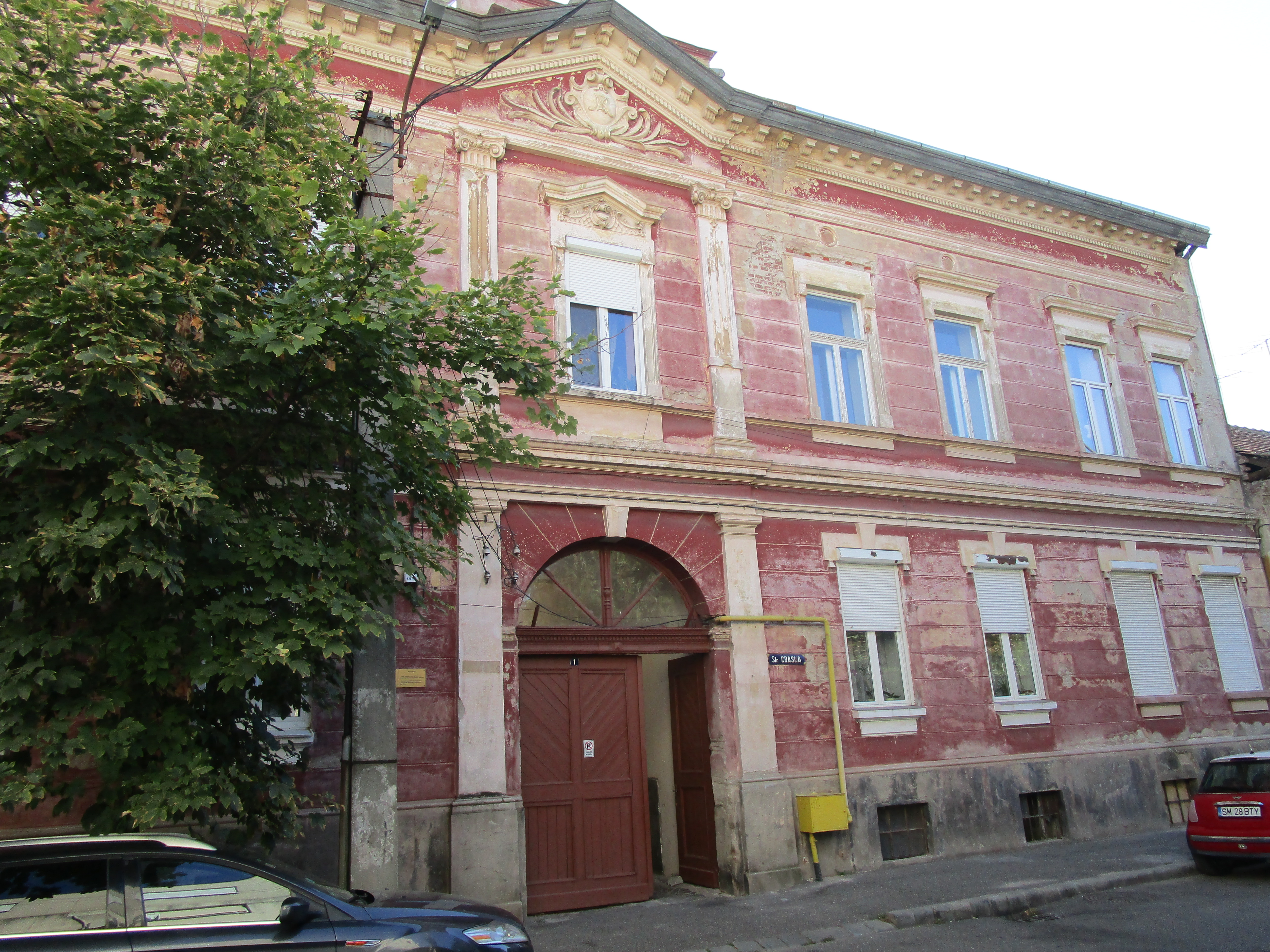 Casa Muhi